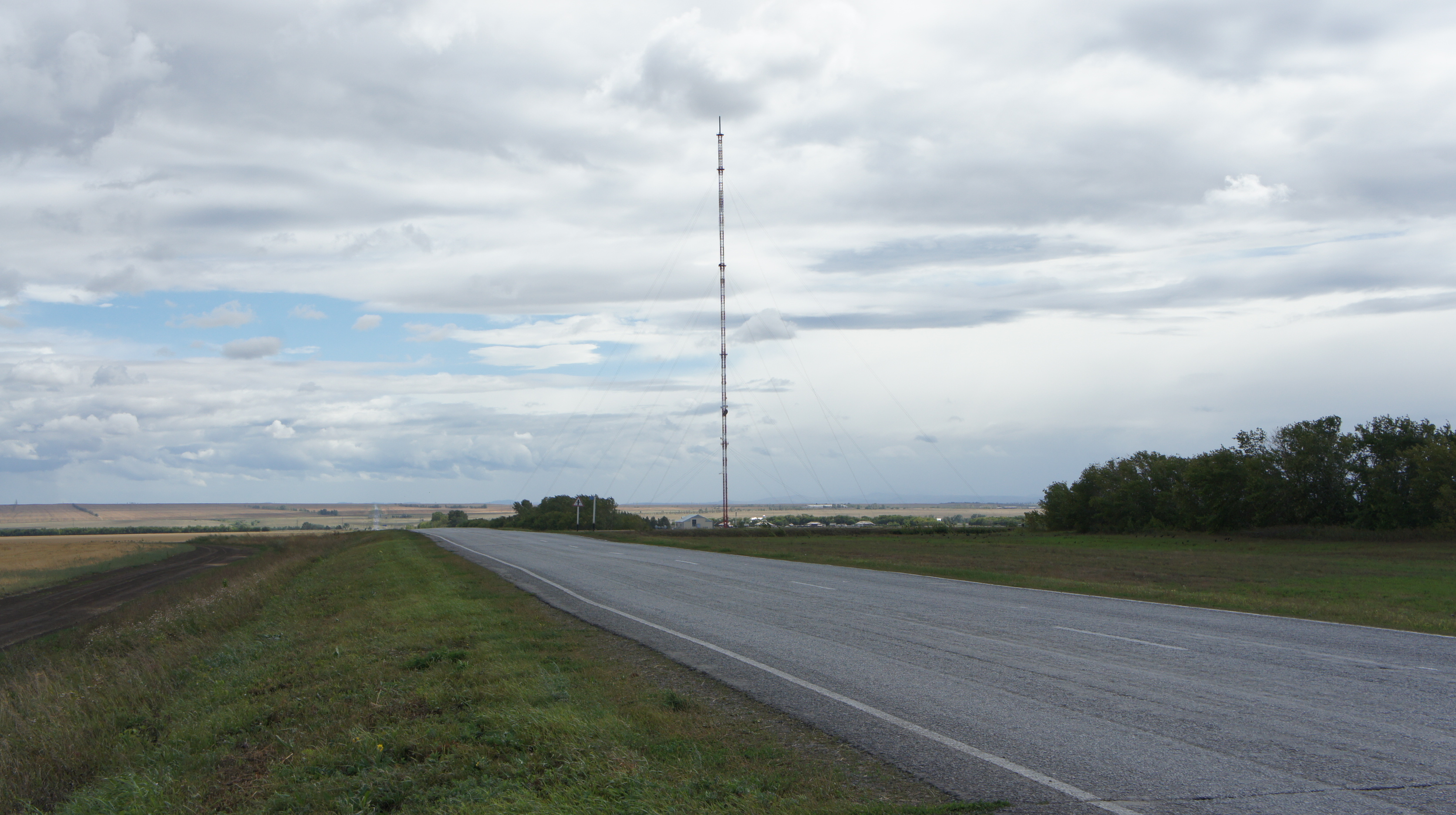 Телевизионная башня в Усть-Калманке - самое высокое рукотворное сооружение в Сибири